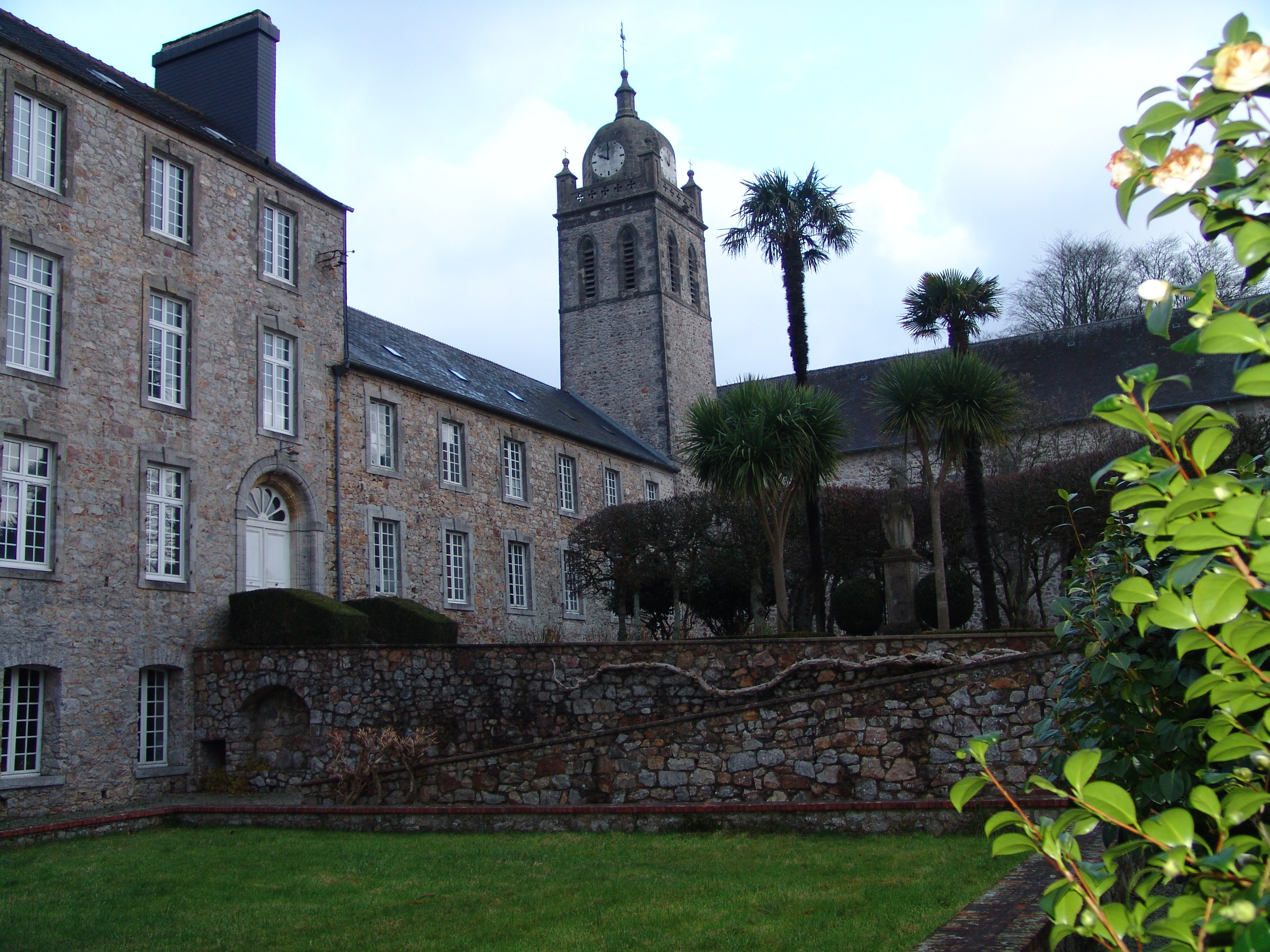 Vue d'une cour intérieure de l'abbaye et de son clocher.